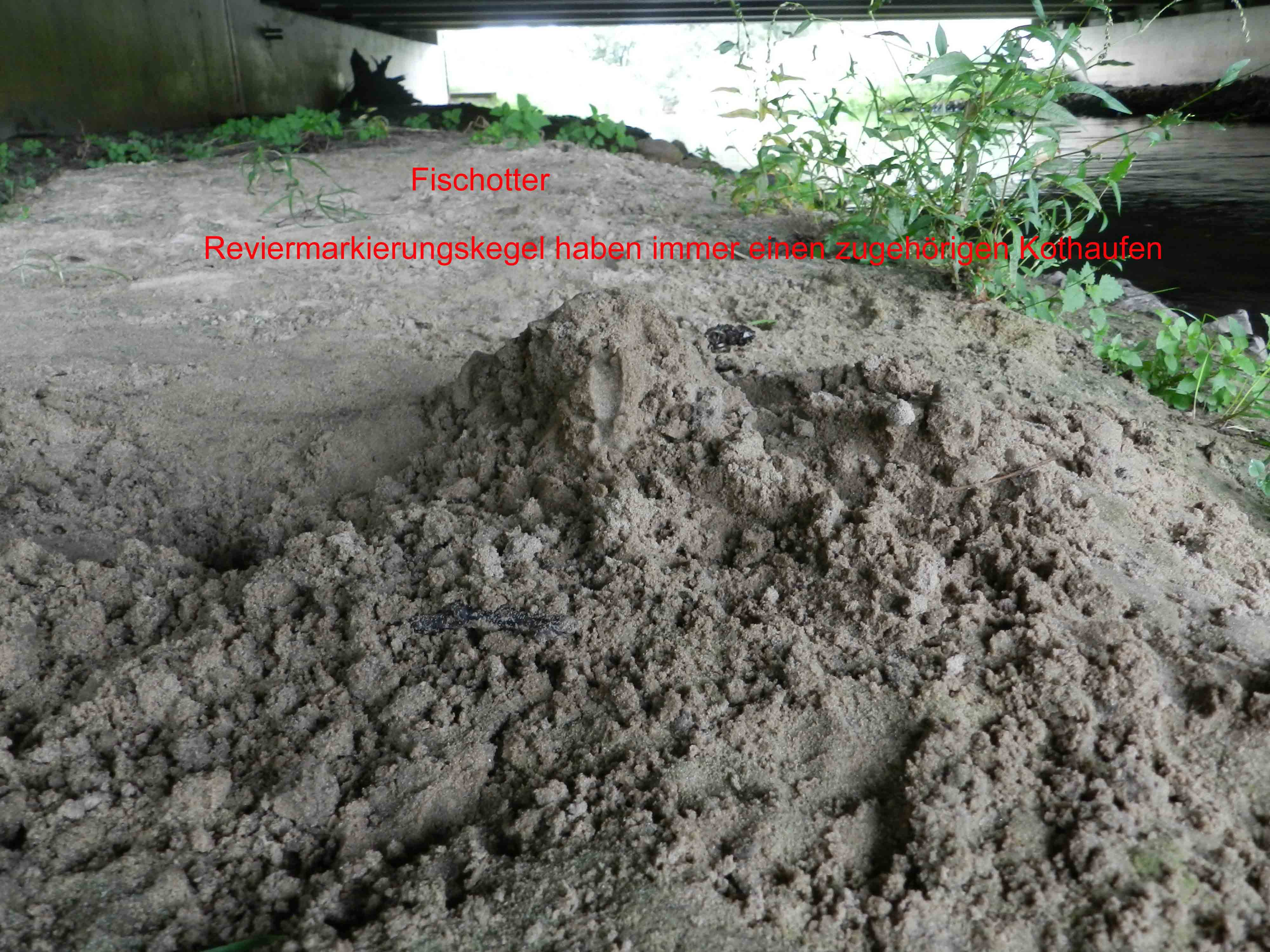 Die Stadt Ortrand wird von der Pulsnitz durchflossen, die hier FFH-Gebiet ist. Hier sind u.a. Biber, Fischotter, Teichmuschel, Eisvogel und mehrere Fledermausarten heimisch.